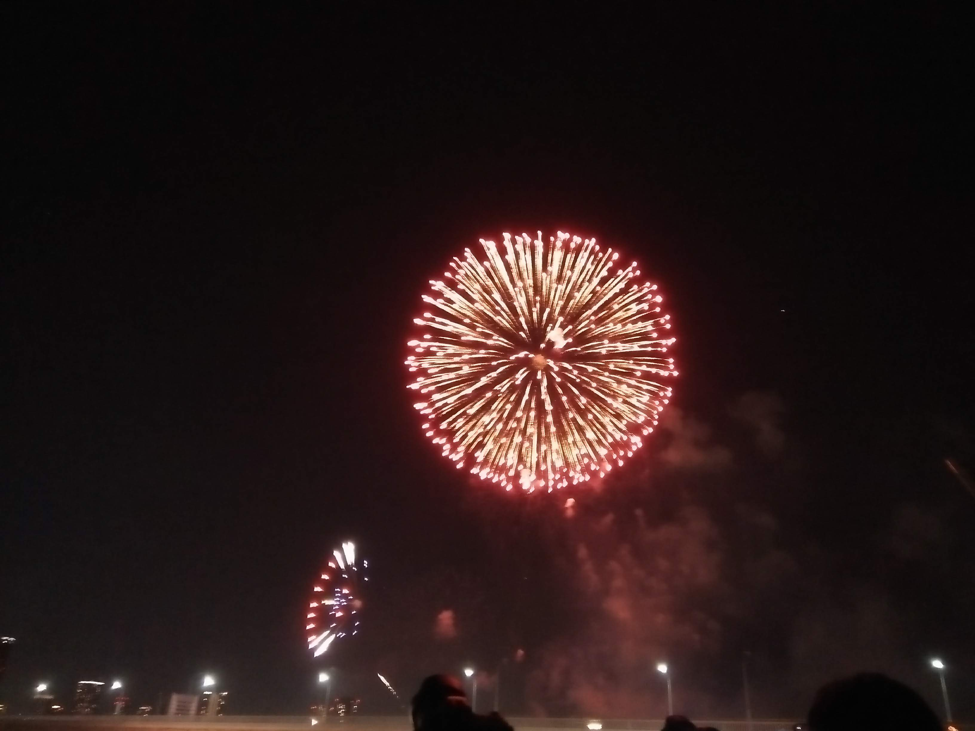 Kembang api di Yodogawa Osaka, Jepang